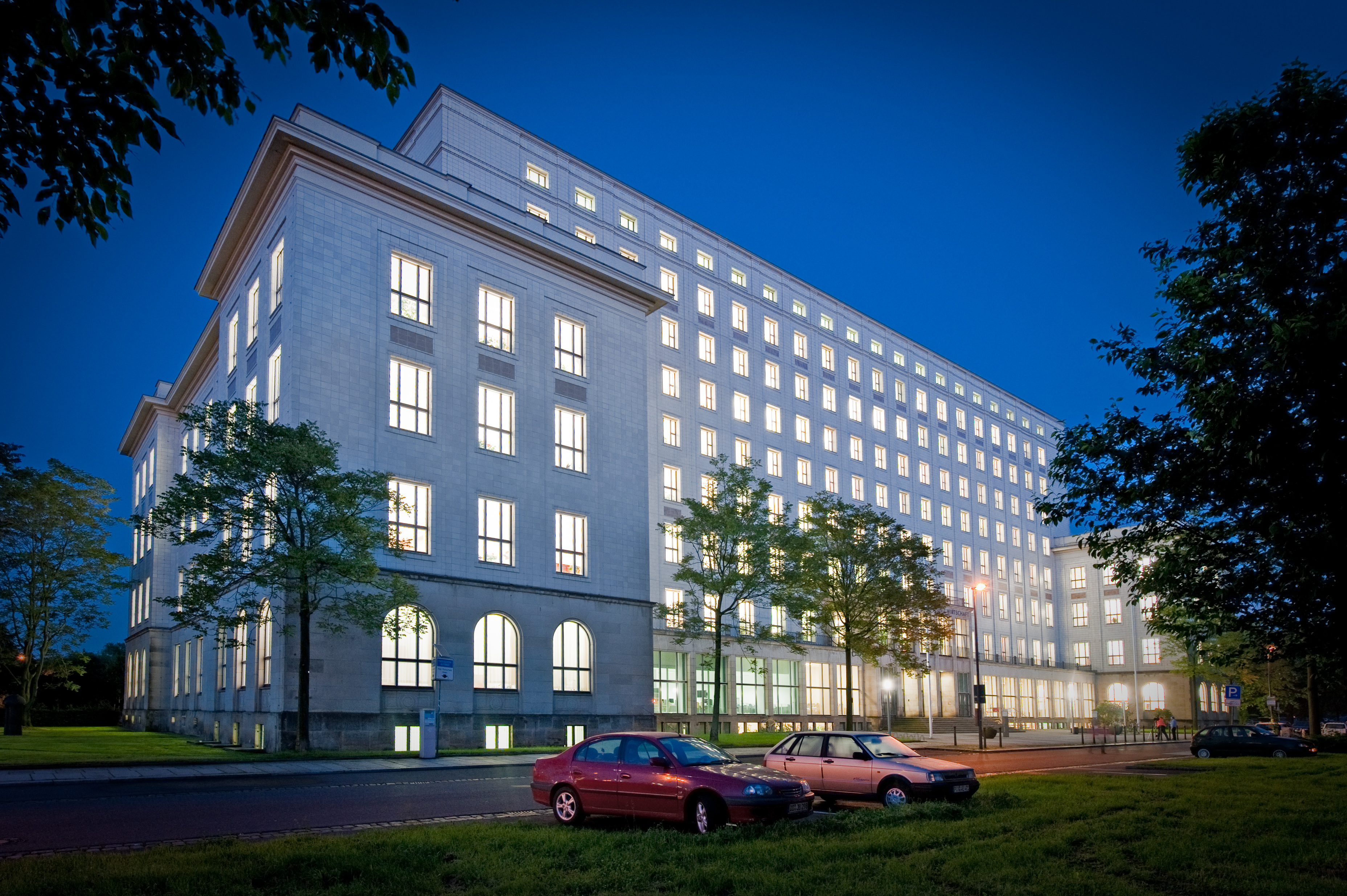 Blick auf das nächtlich beleuchtete Zentralgebäude (Z Gebäude) auf dem Campus Friedrich List Platz